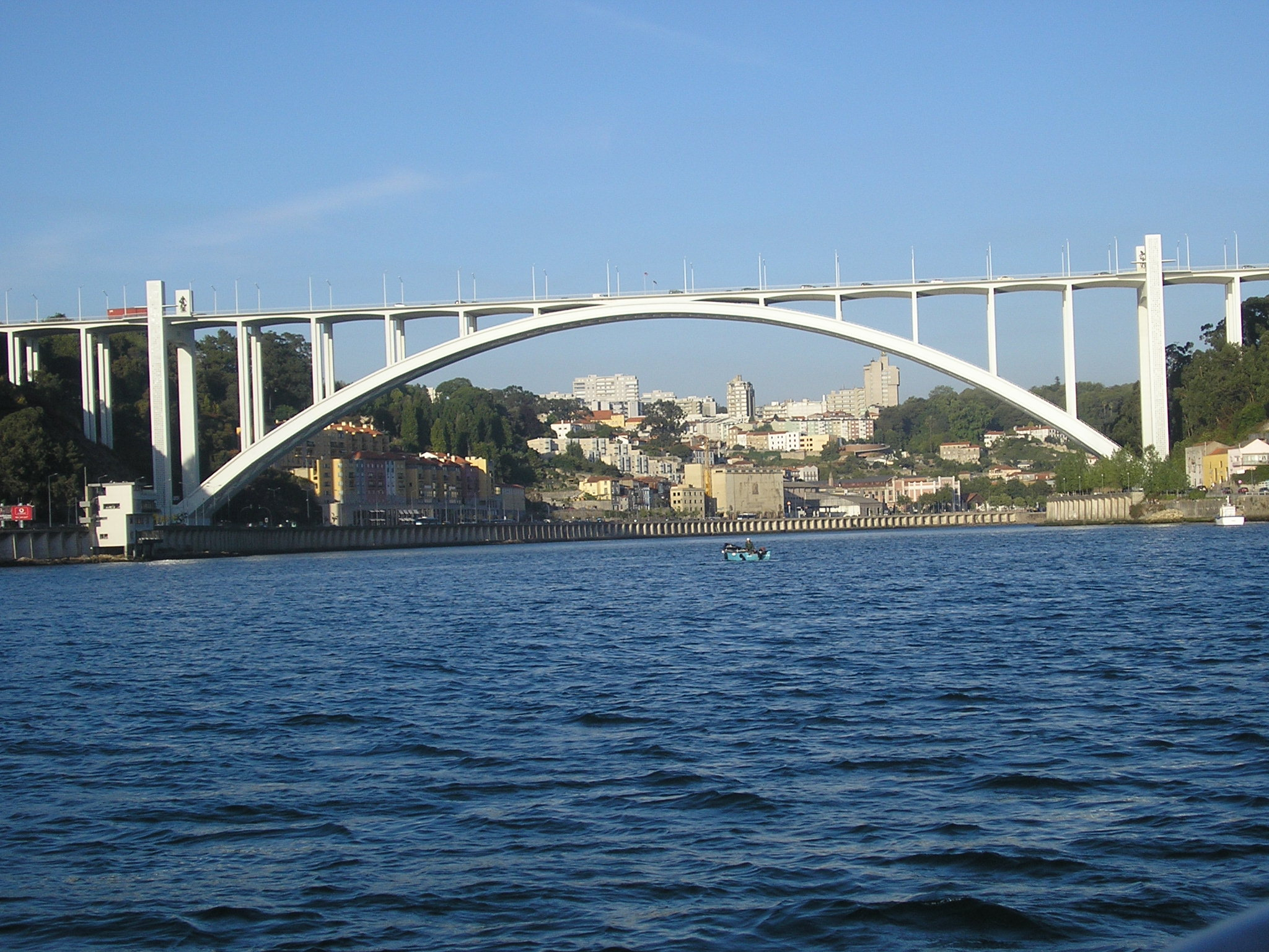 Porto/Vila Nova de Gaia This file was uploaded for Wiki Loves Monuments in Portugal with the unique identifier 70797.